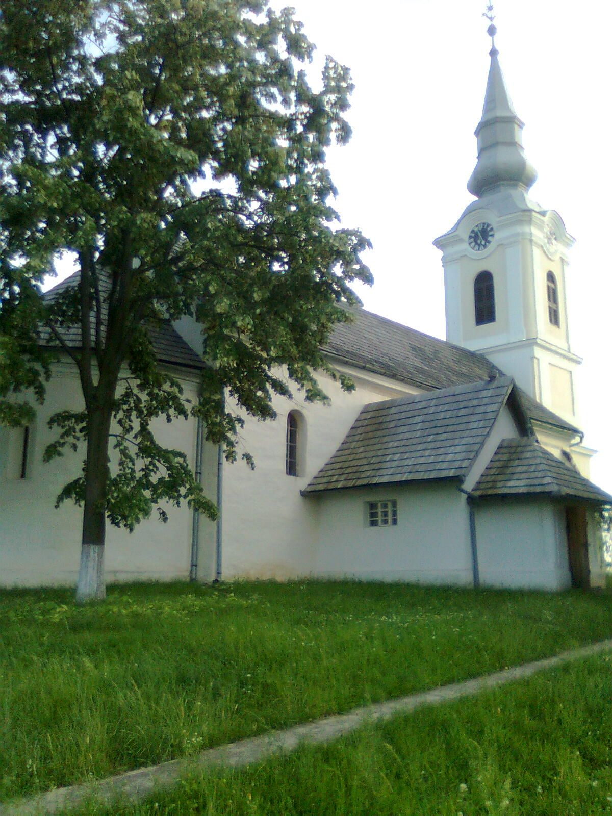 Református templom Siter településen (Bihar megye, Erdély)